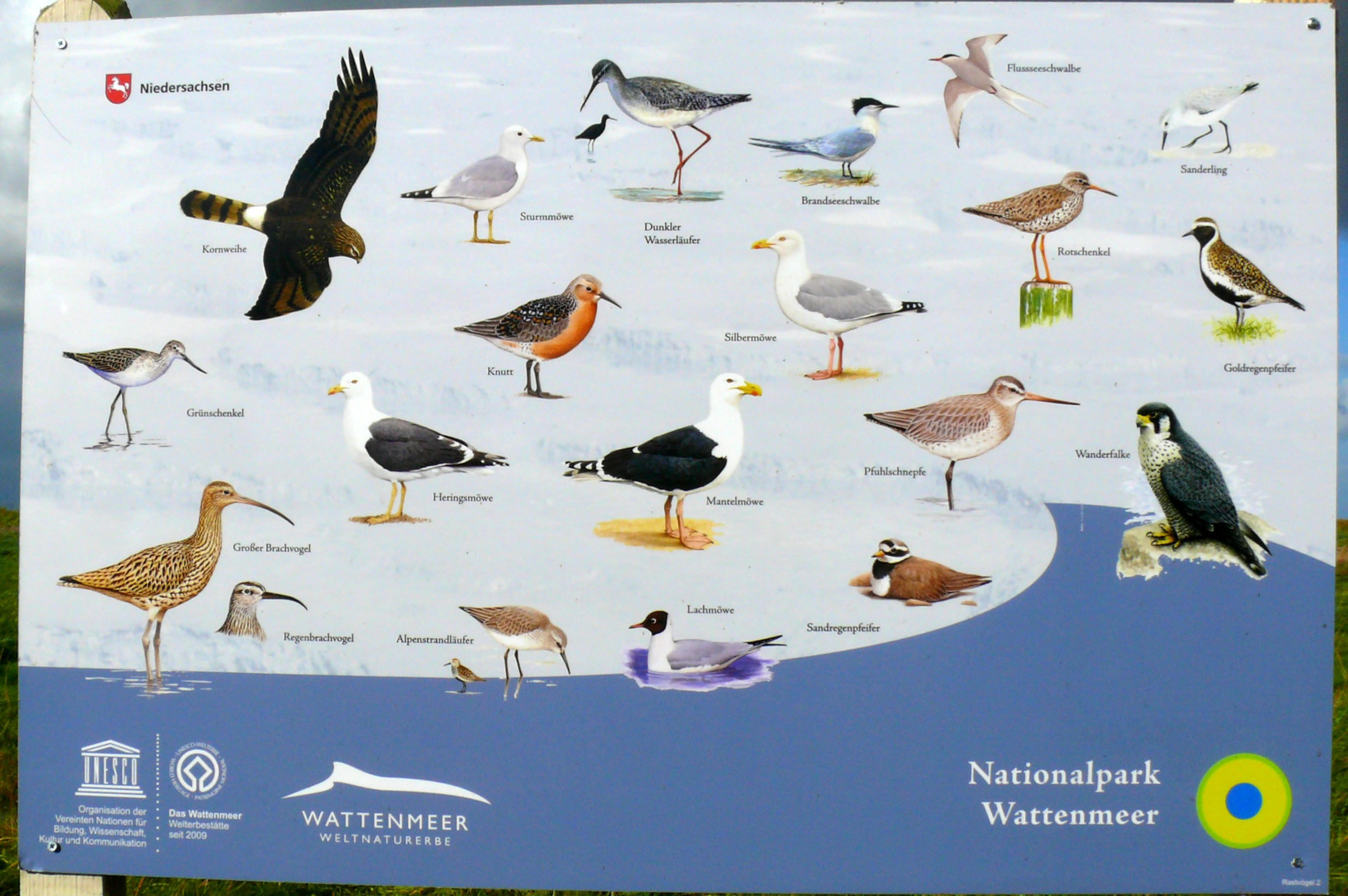 Vögel im Wattenmeer, Tafel am Vareler Hafen während der Zugvogeltage 2012